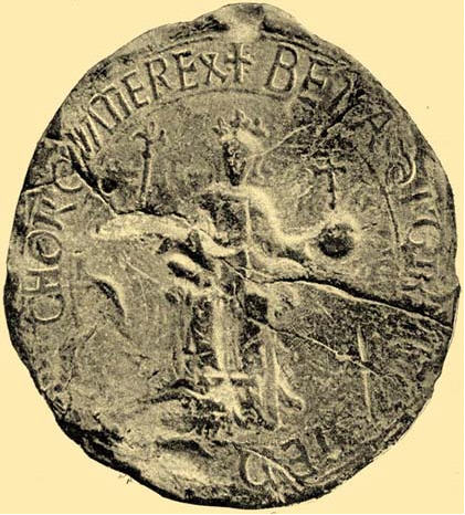 Béla II. - pečeť